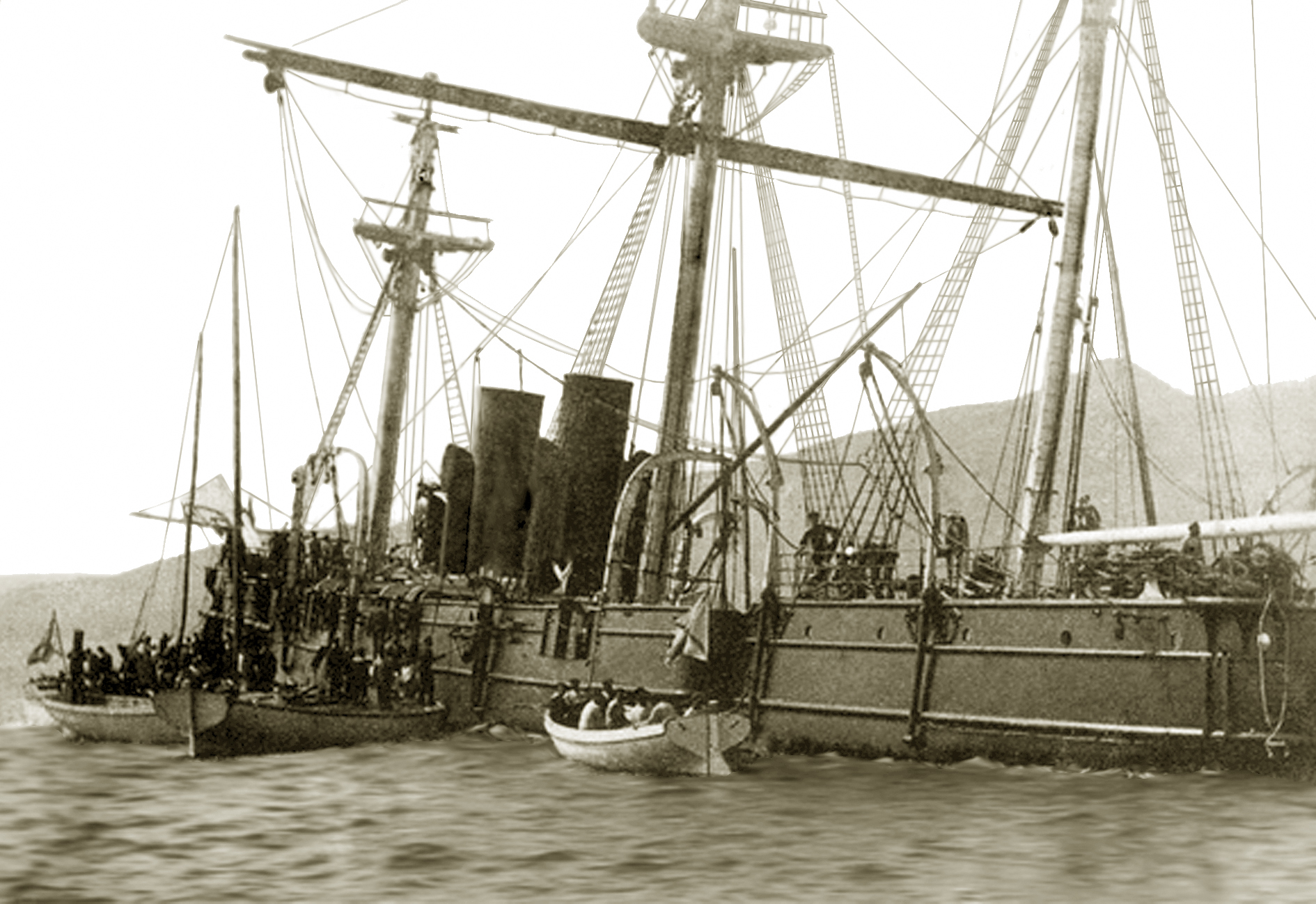 Корвет "Витязь" на камнях в проливе Невельского.